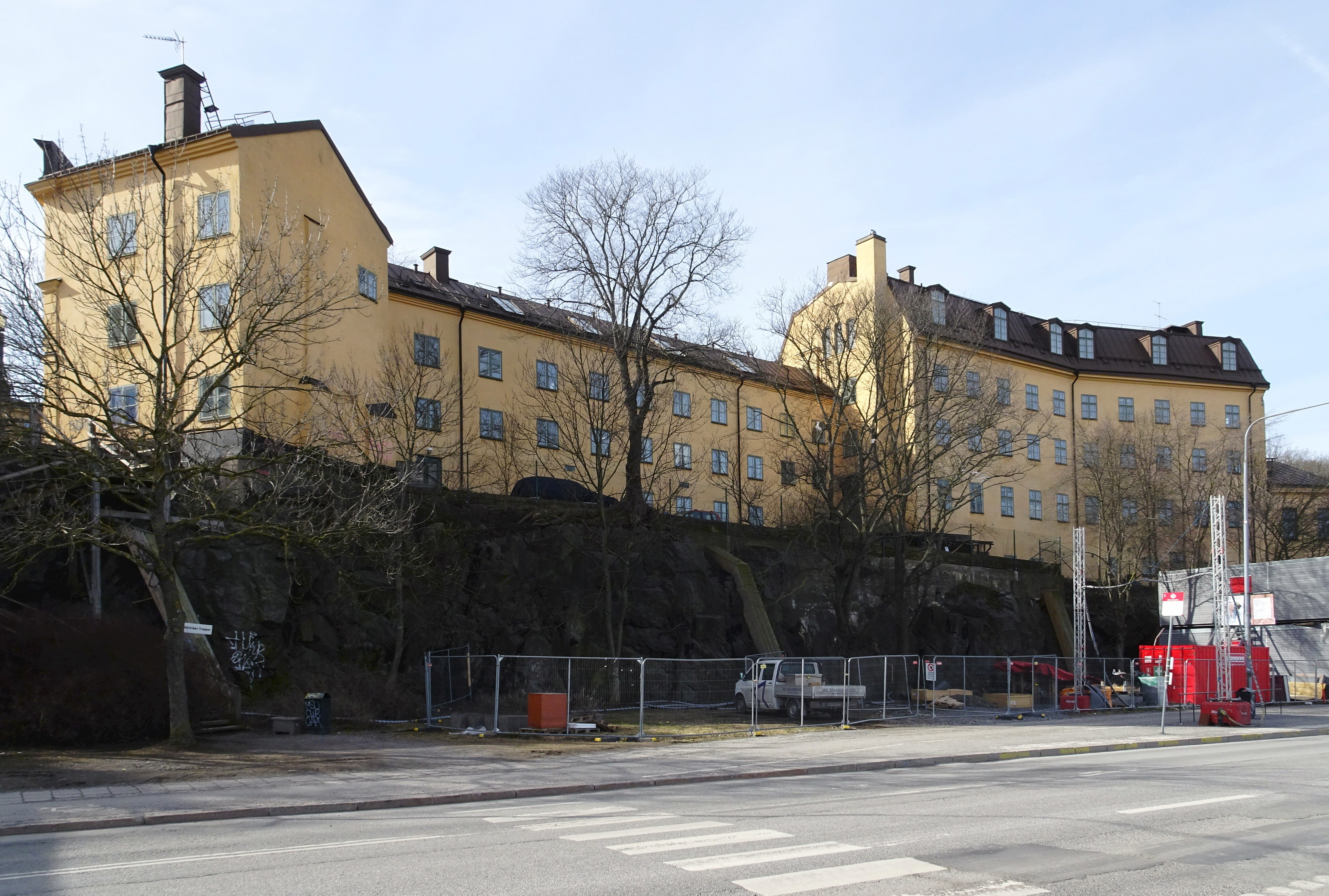 Kvarteret Dihlströms från Katarinavägen